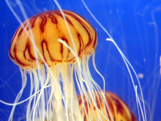 クラゲ